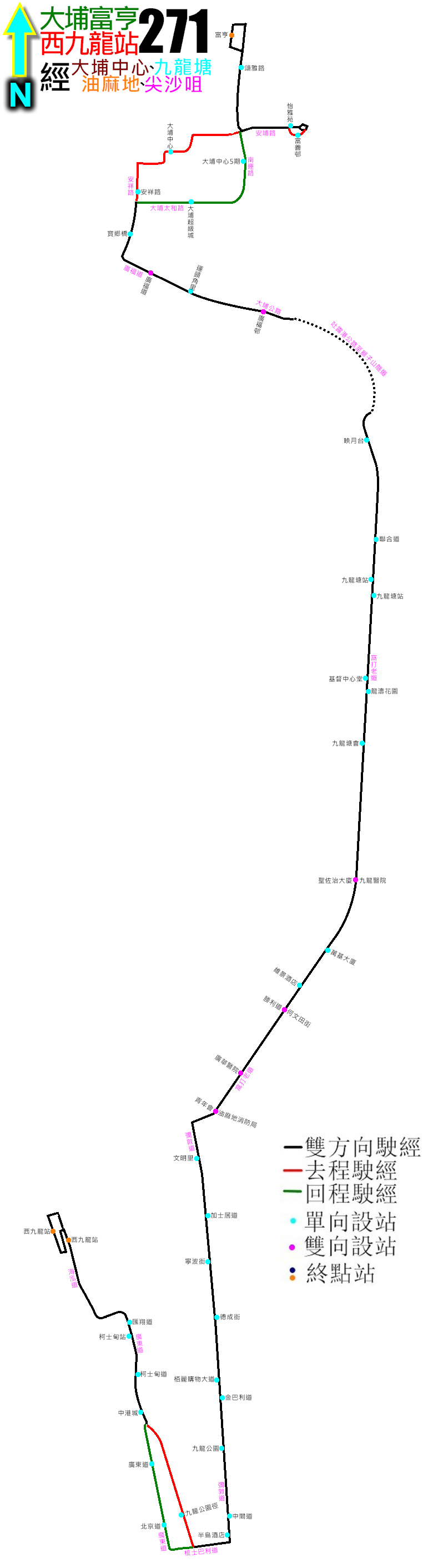 中文（香港）: 九巴271線的走線圖